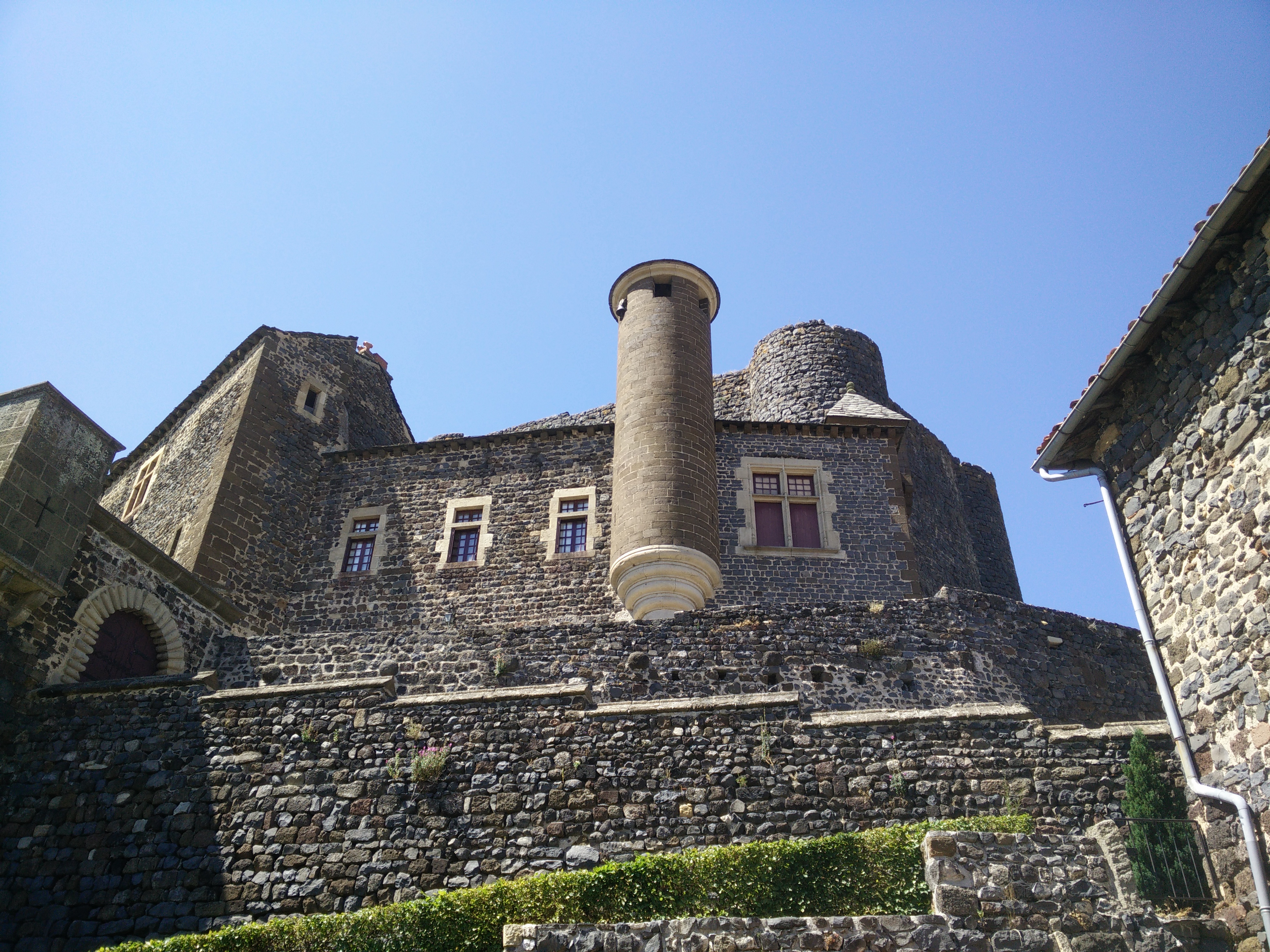 Château de Bouzols